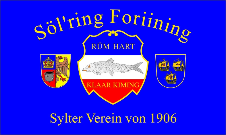 Hissfahne Söl'ring Foriining